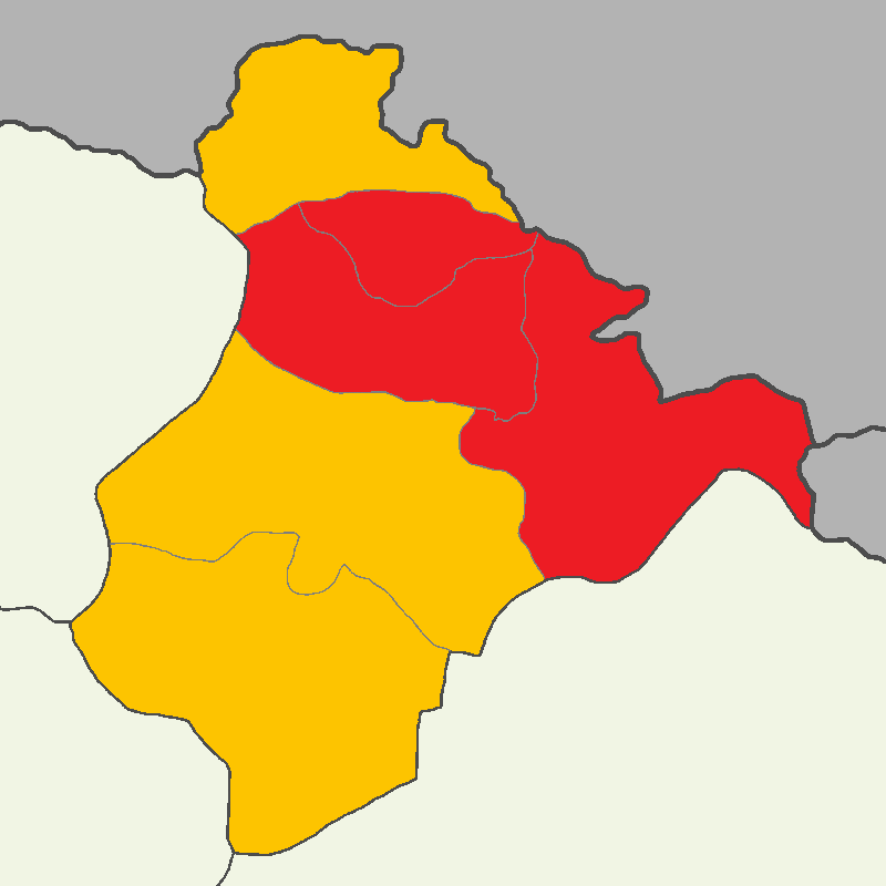 Ardahan'da 2014 Türkiye cumhurbaşkanlığı seçimi